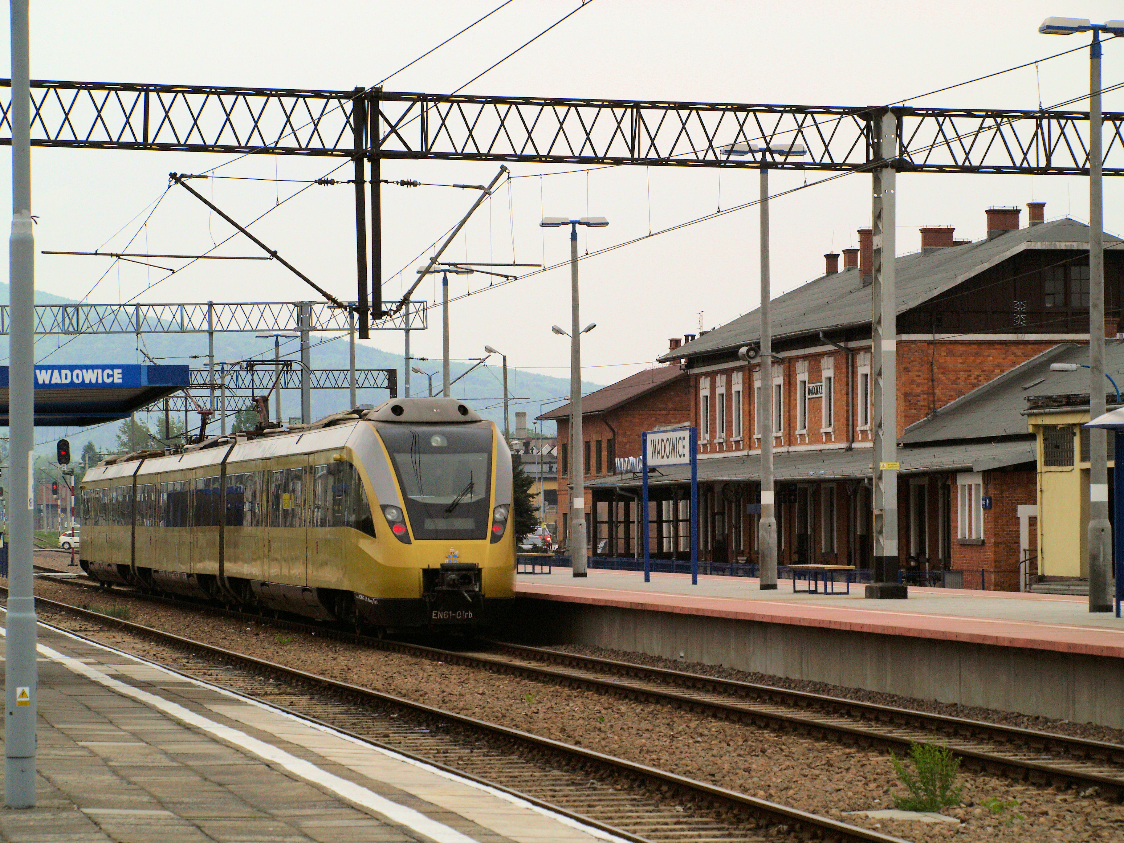 Stacja kolejowa w Wadowicach.